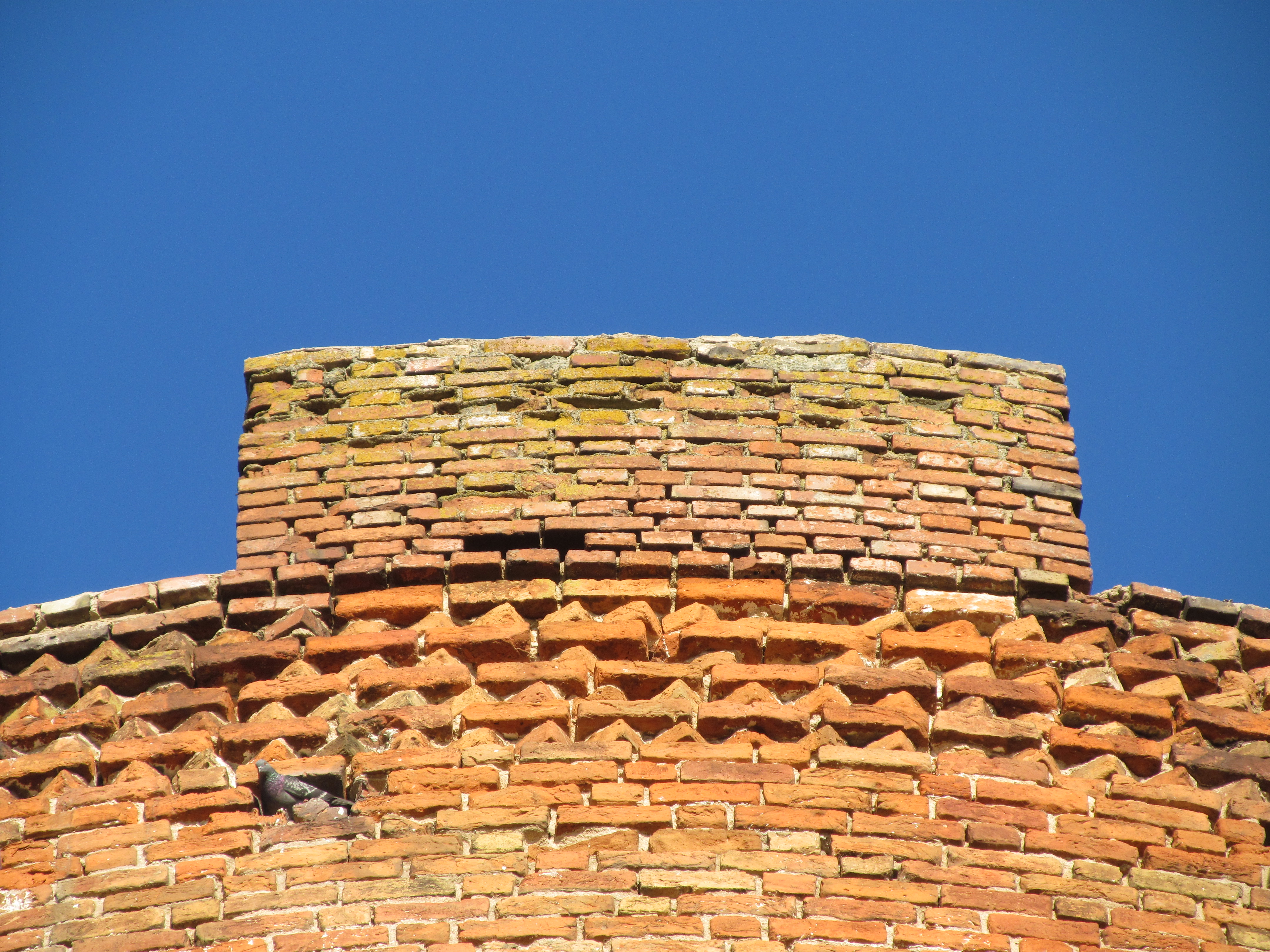 Зубец вежы без назіральнага акна